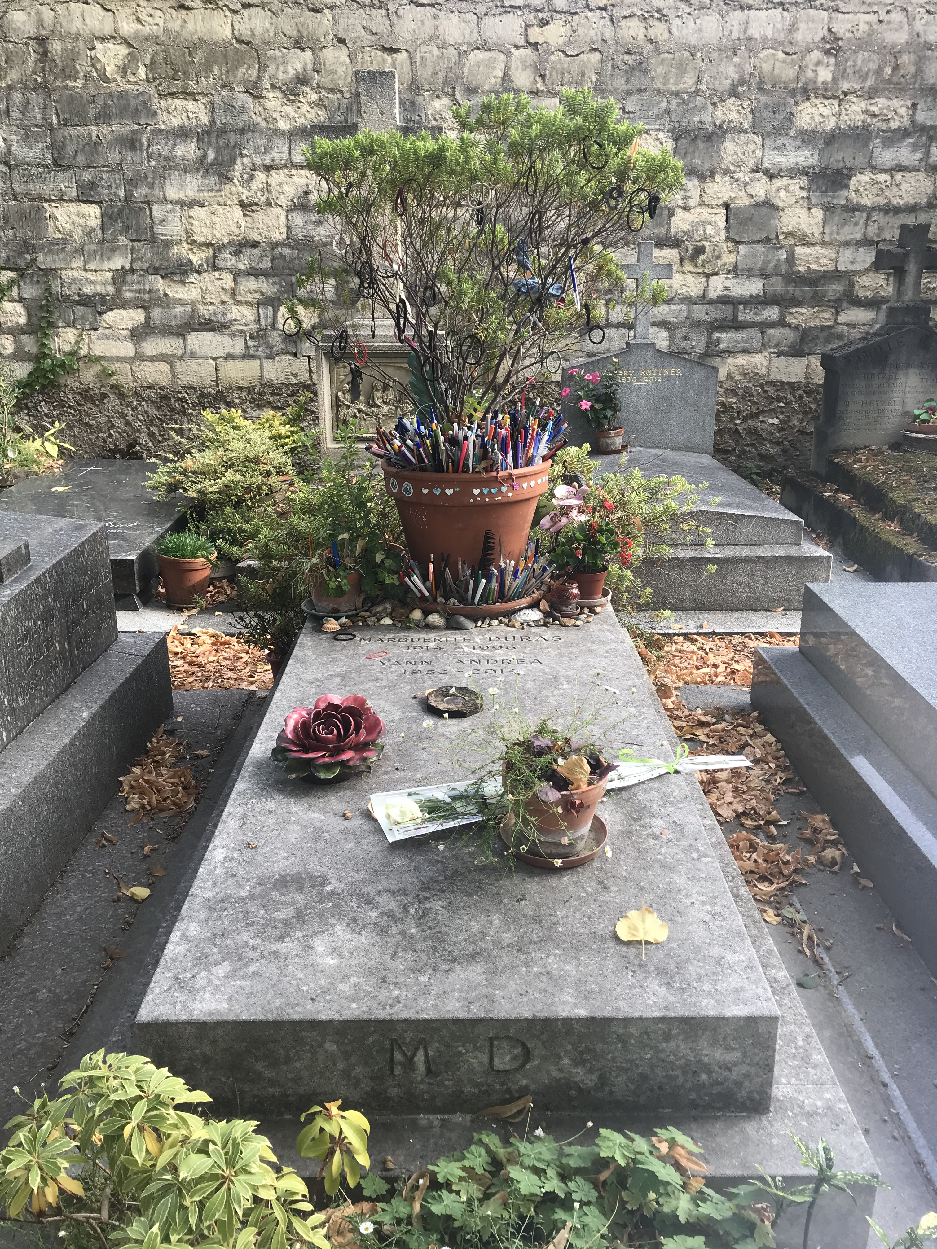 Cimetière du Montparnasse - septembre 2018.